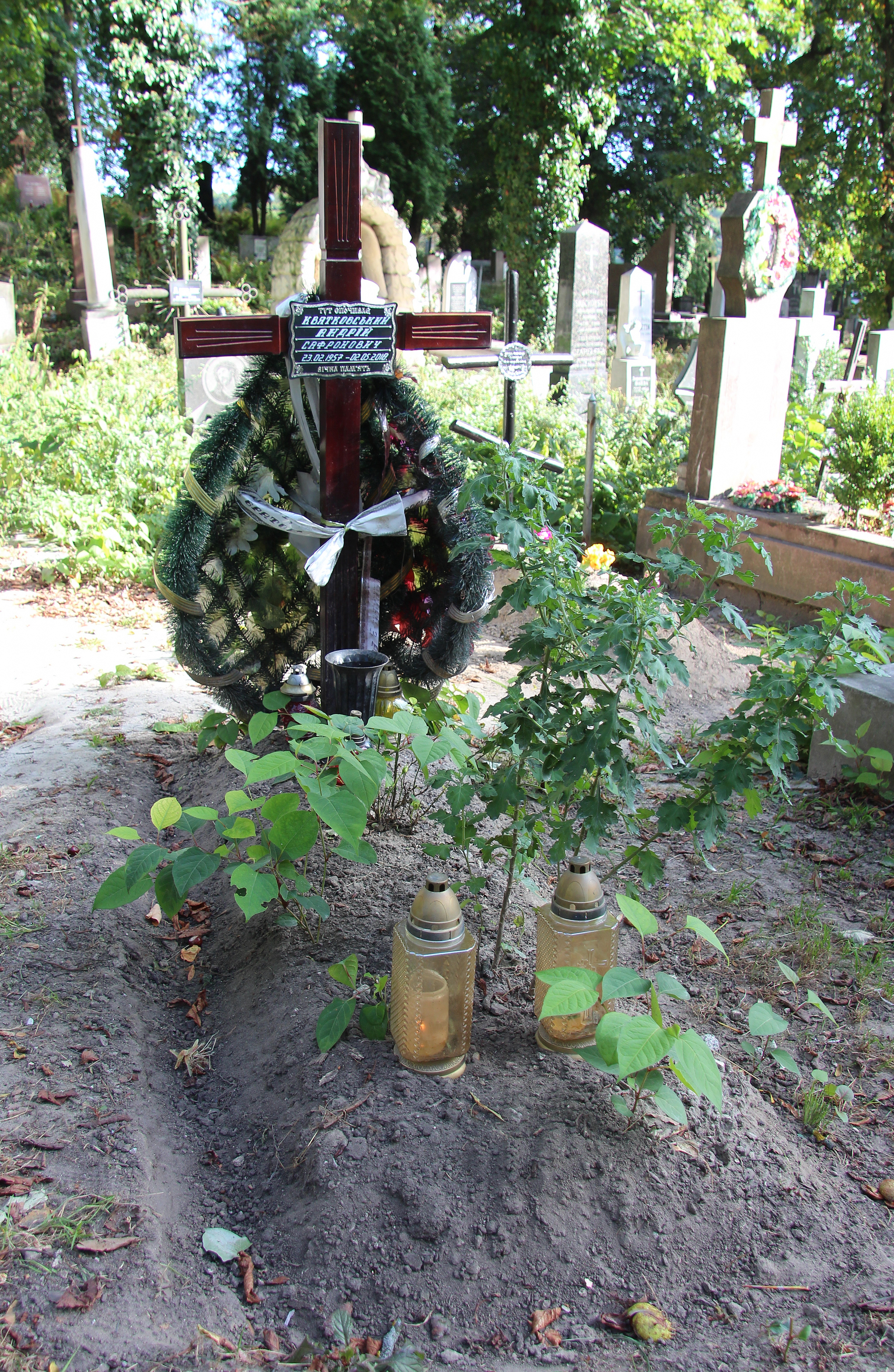 Могила А. Квятковського. Личаківський цвинтар ,поле № 21.